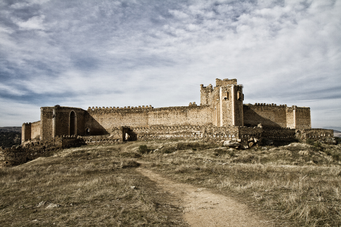 Castillo Templario de la Puebla de Montalbán -Toledo- España